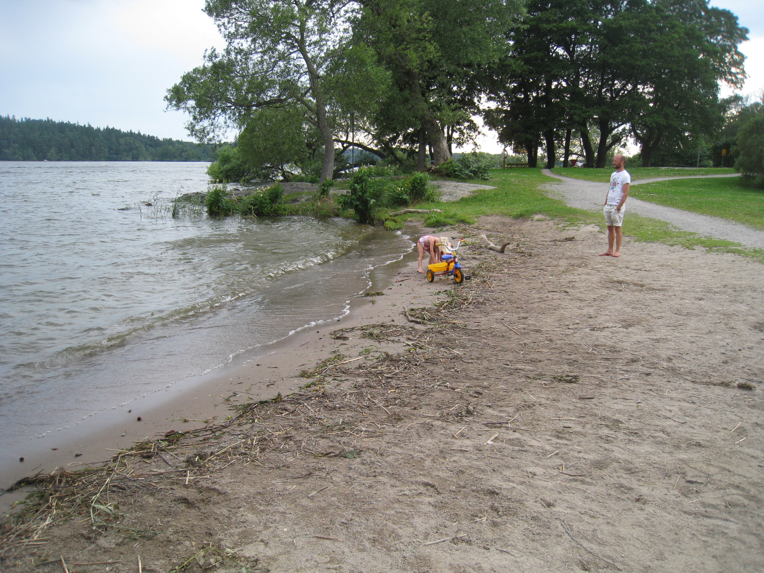 Ålstensängens natur vid Mälaren i stadsdelen Ålsten i södra Bromma väster om Stockholm.